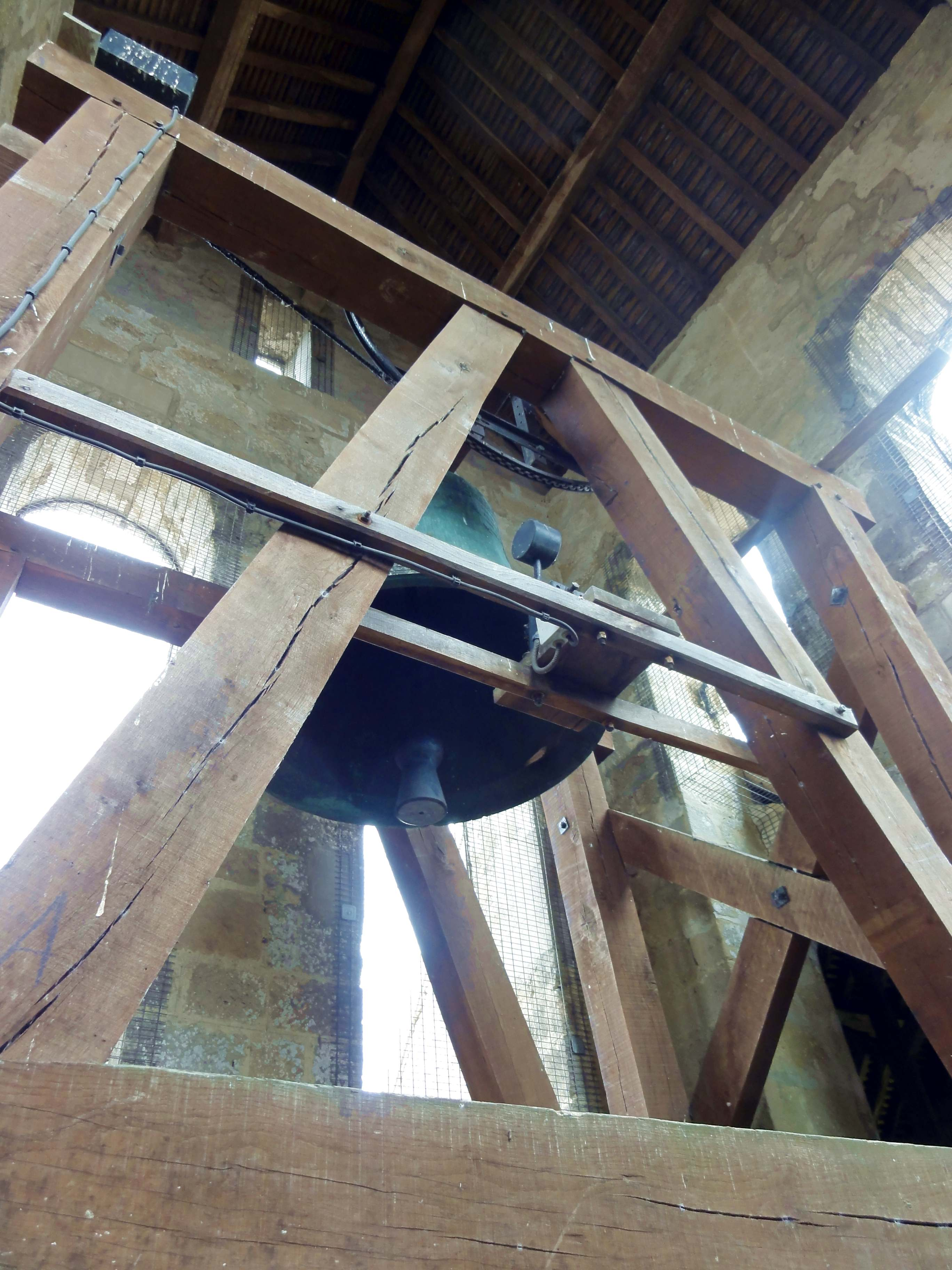 Intérieur de l'église (voir titre).